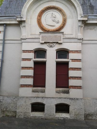 Façade composée d'une tête de percheron, haras de Blois